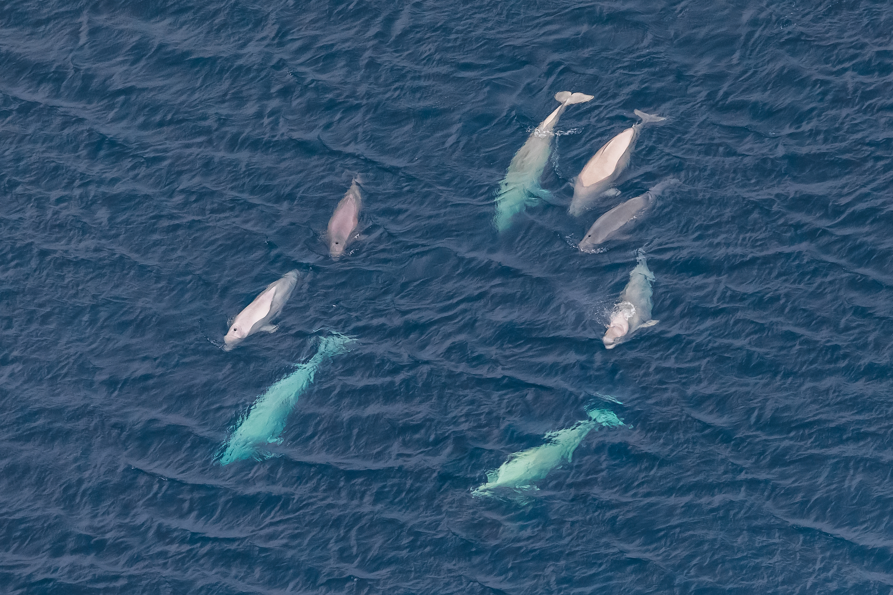 Национальный парк «Русская Арктика»: северная часть архипелага Новая Земля и Земля Франца-Иосифа, Новая Земля, Архангельская область This image is related to the protected area of Russia number 2900112